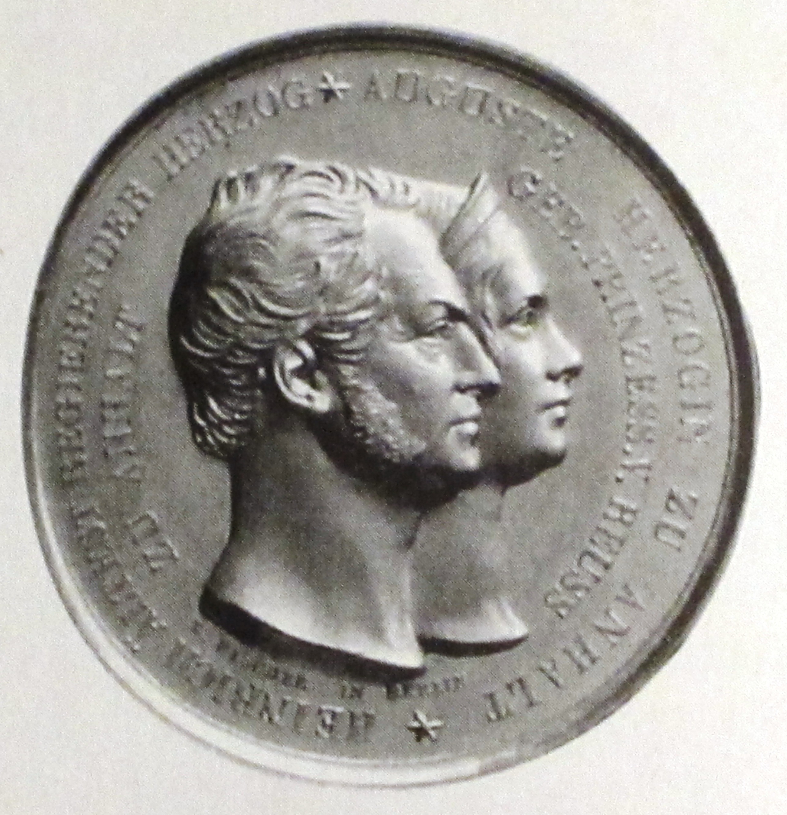 Medaille von 1844 auf die Silberhochzeit von Heinrich von Anhalt-Köthen (1778–1847) und Auguste von Reuß (1794–1855)